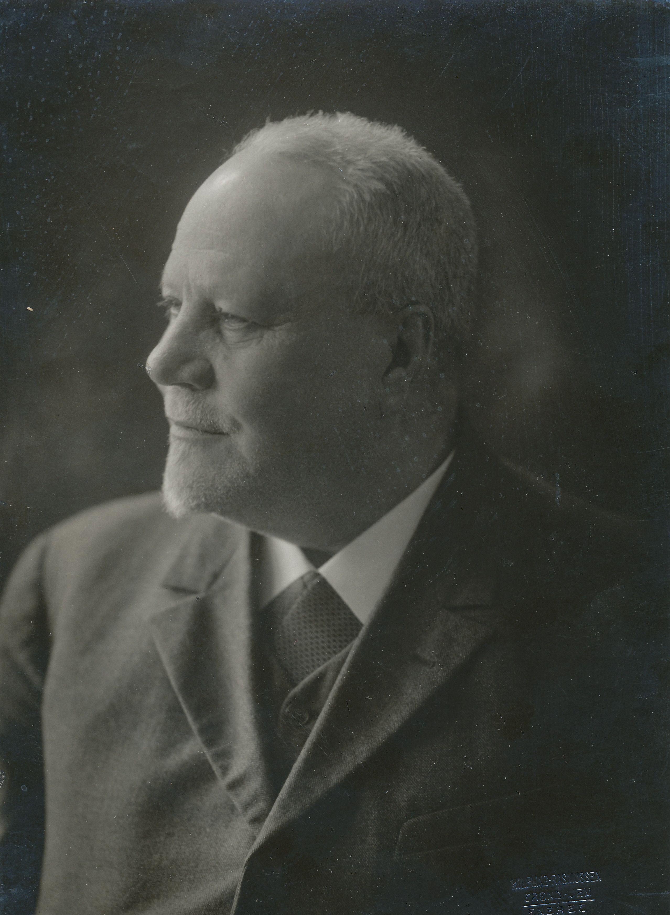 Ole Nordgaard (1862–1931), zoolog og konservator.